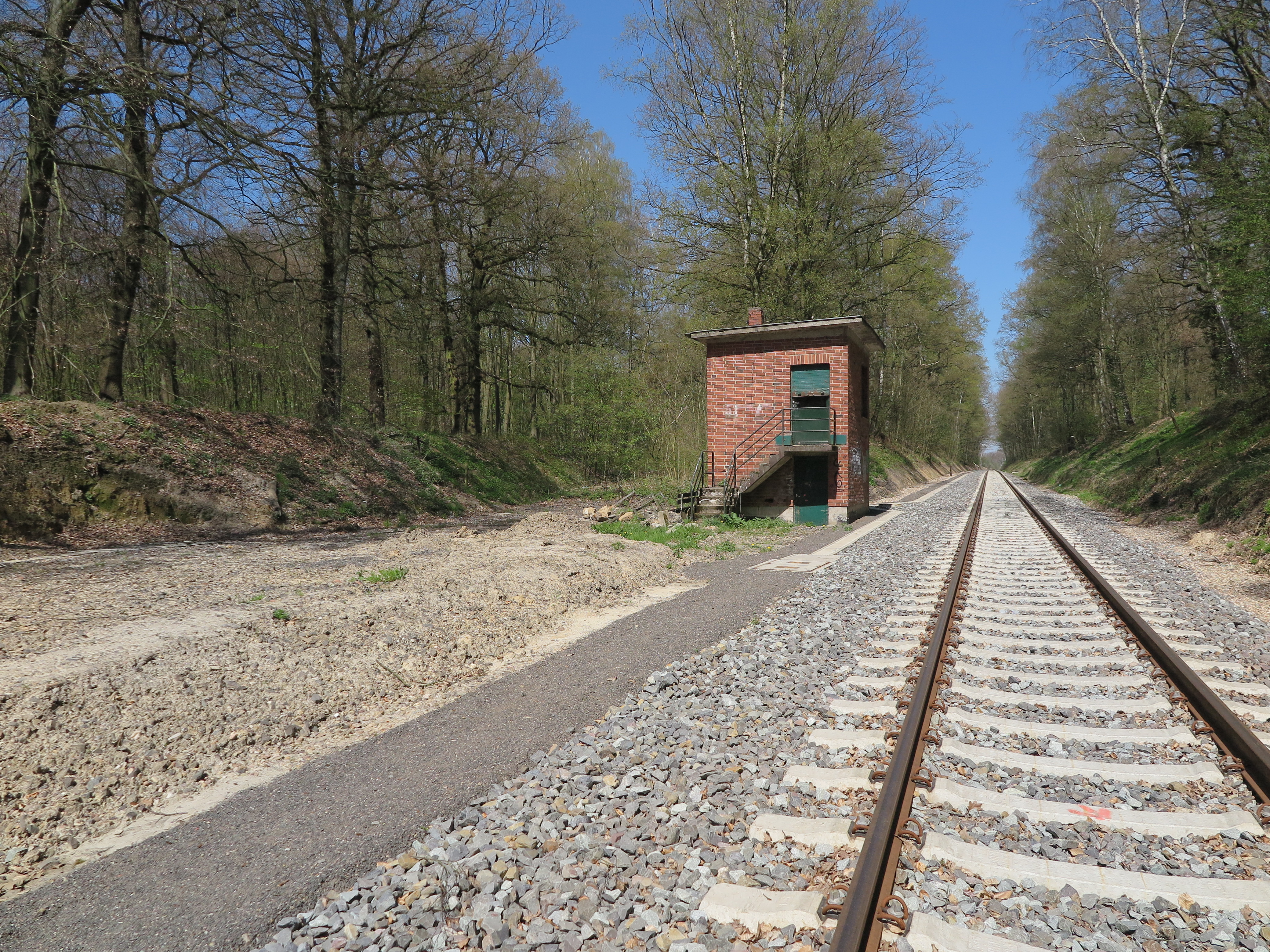 Der Abzweig Quinx an der Bahnstrecke Stolberg–Herzogenrath im April 2015. Rechts der für die Reaktivierung fertiggestellte Streckenast nach Merzbrück. Links der völlig zugewucherte Streckenast der ehemaligen Bahnstrecke Stolberg–Kohlscheid.